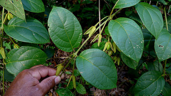 CC-BYCallPhotos Alex V.Popopkin Entre Rios, Bahia. Brasil